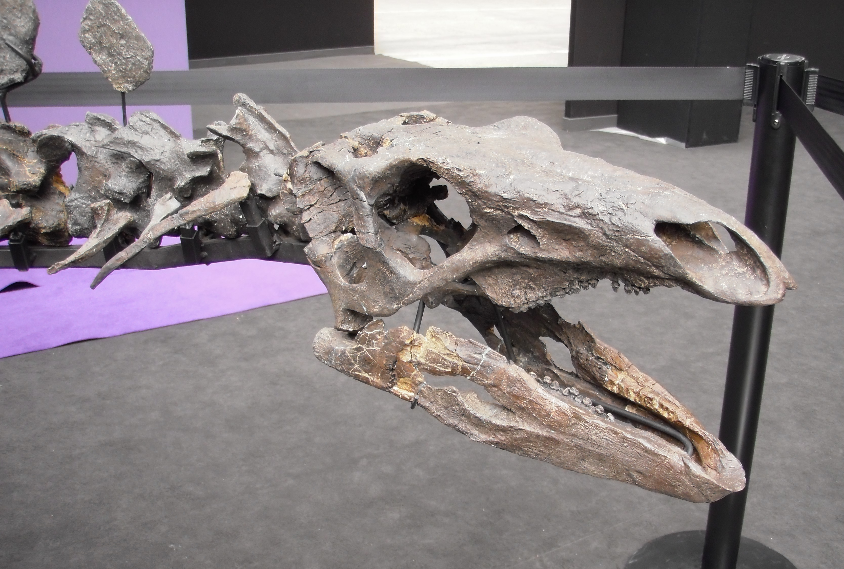 Crâne d'un Stégosaurus